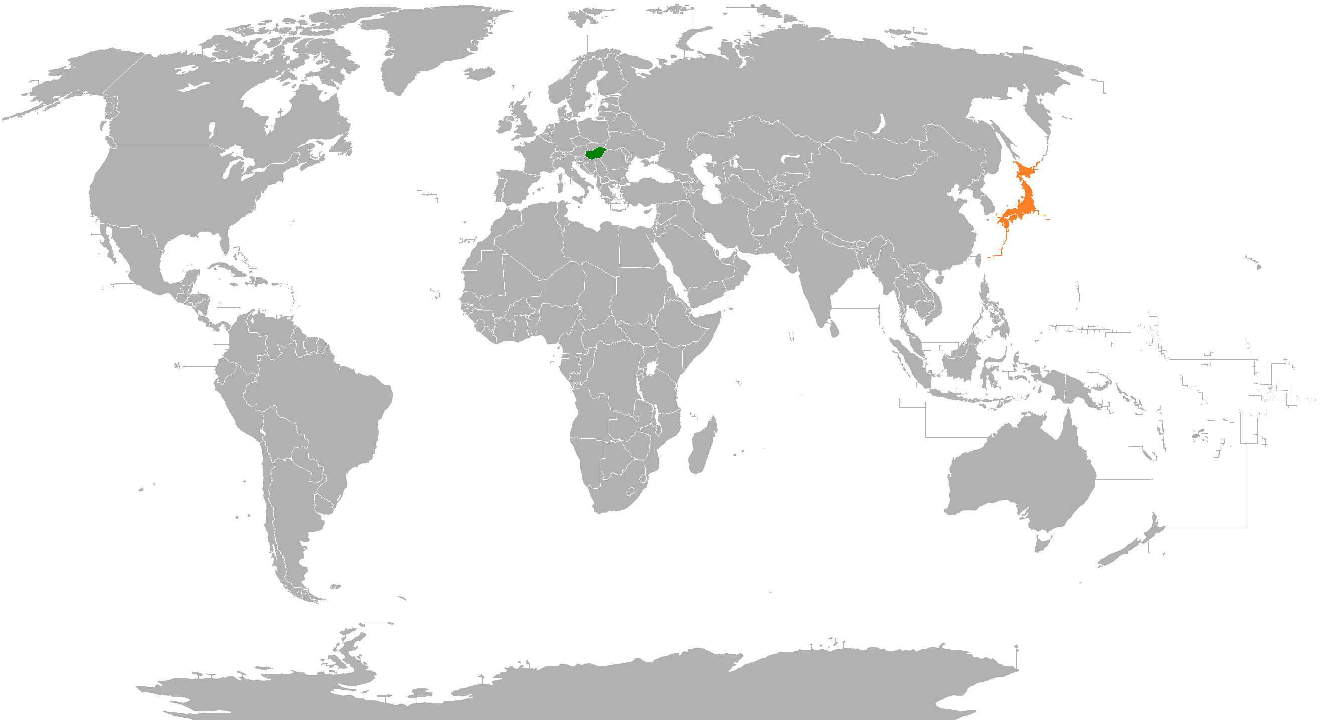 Hungary-Japan locator map.